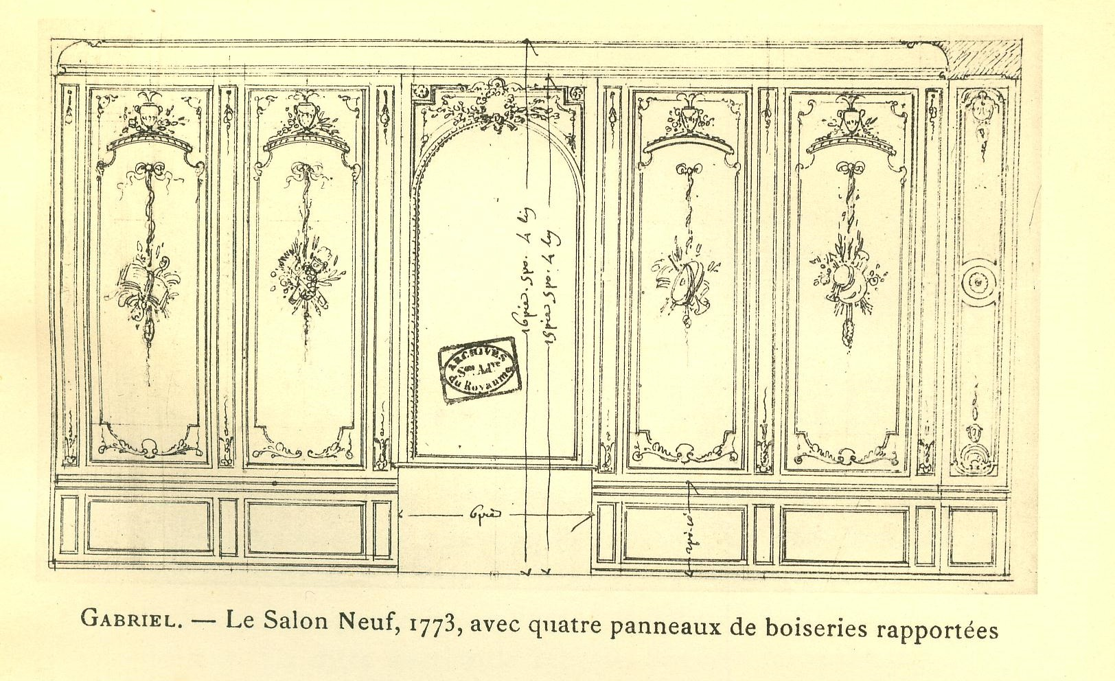 Paroi face aux croisées du deuxième salon. Avec des boiseries remployées datant vers 1750.